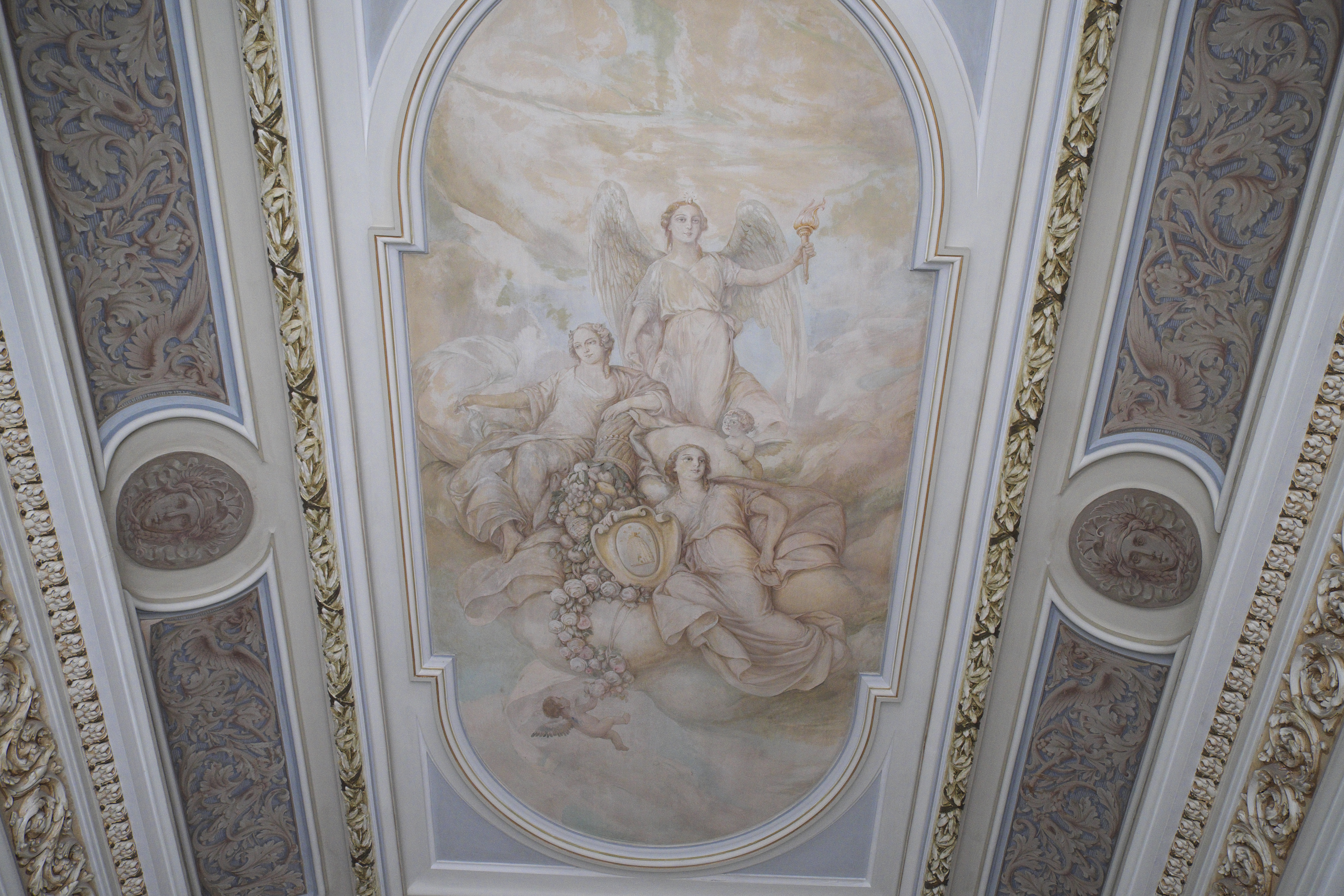 Casa Brunet in Tortosa in der Provinz Tarragona (Katalonien/Spanien), Calle Cervantes 7, Eklektizistisches Gebäude, Sitz der Industrie- und Handelskammer, Deckengemälde im Vorraum